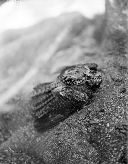 Negatief. Caprimulgus jotaka Temm. in afweerhouding